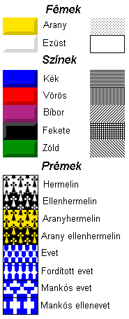 Hegedű alsó része - Violin